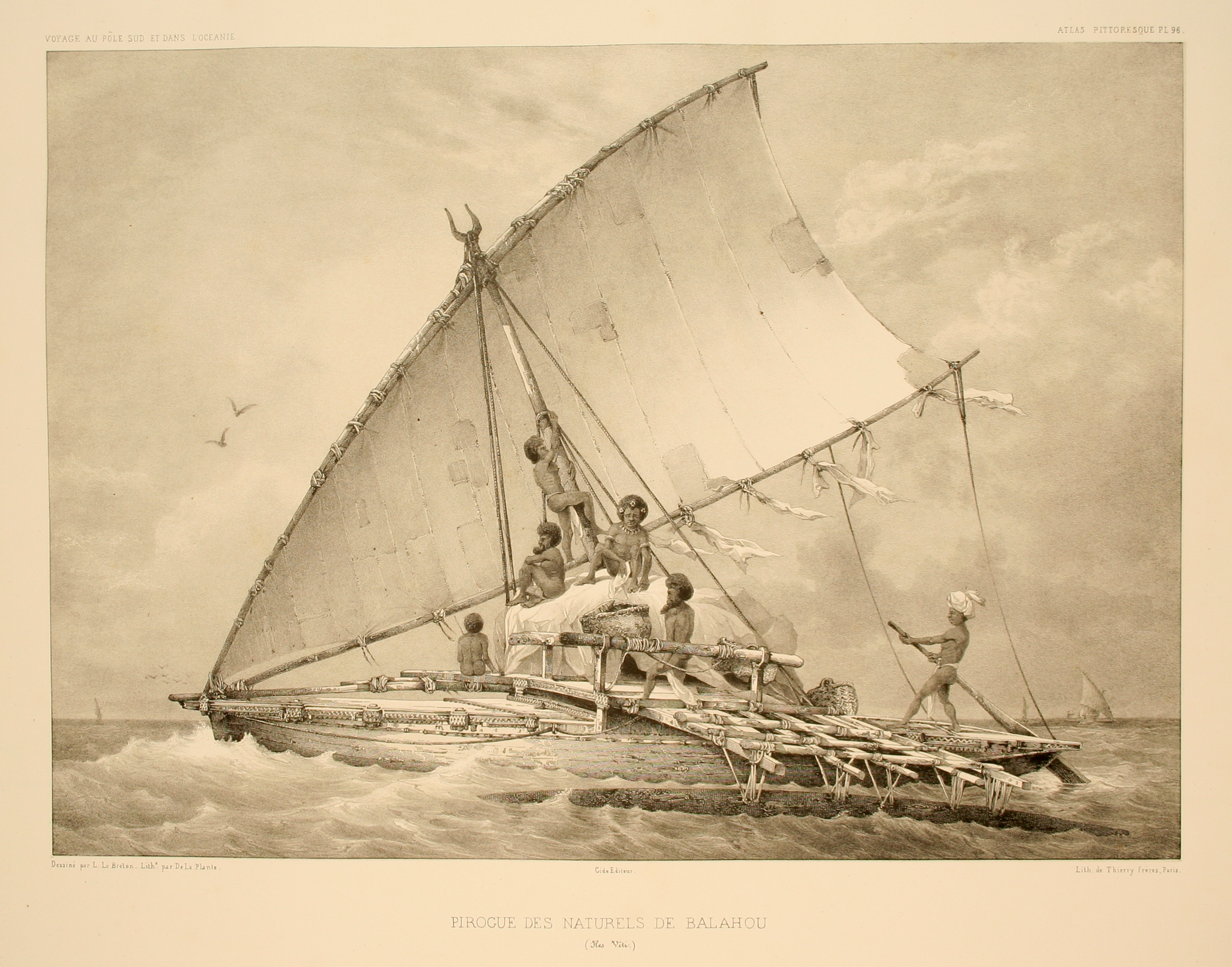 Pirogue des naturels de l'île Obalahou. Atlas pittoresque, planche 96